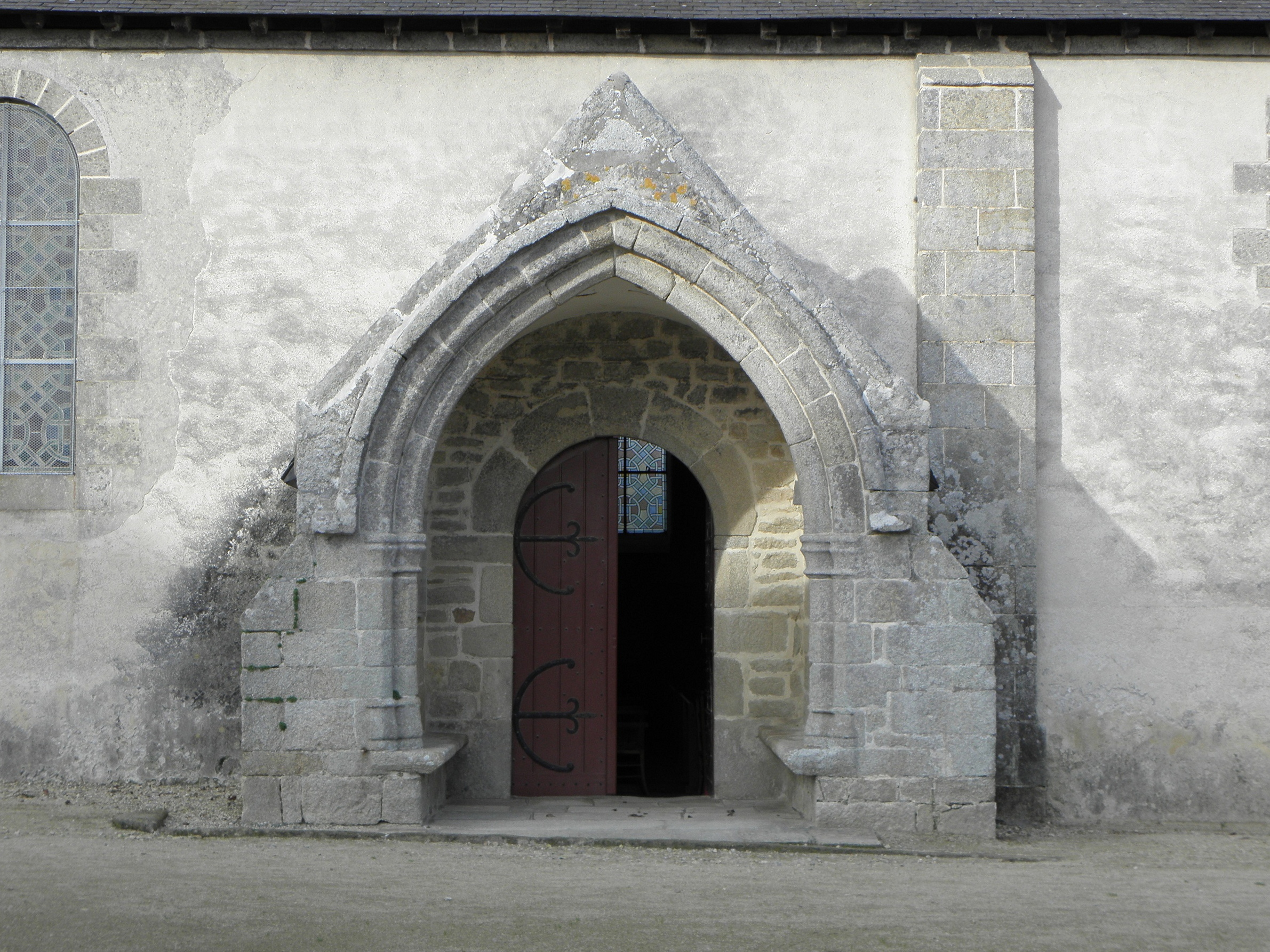 Porche sud de l'église Saint-Tudy de Loctudy (29). .